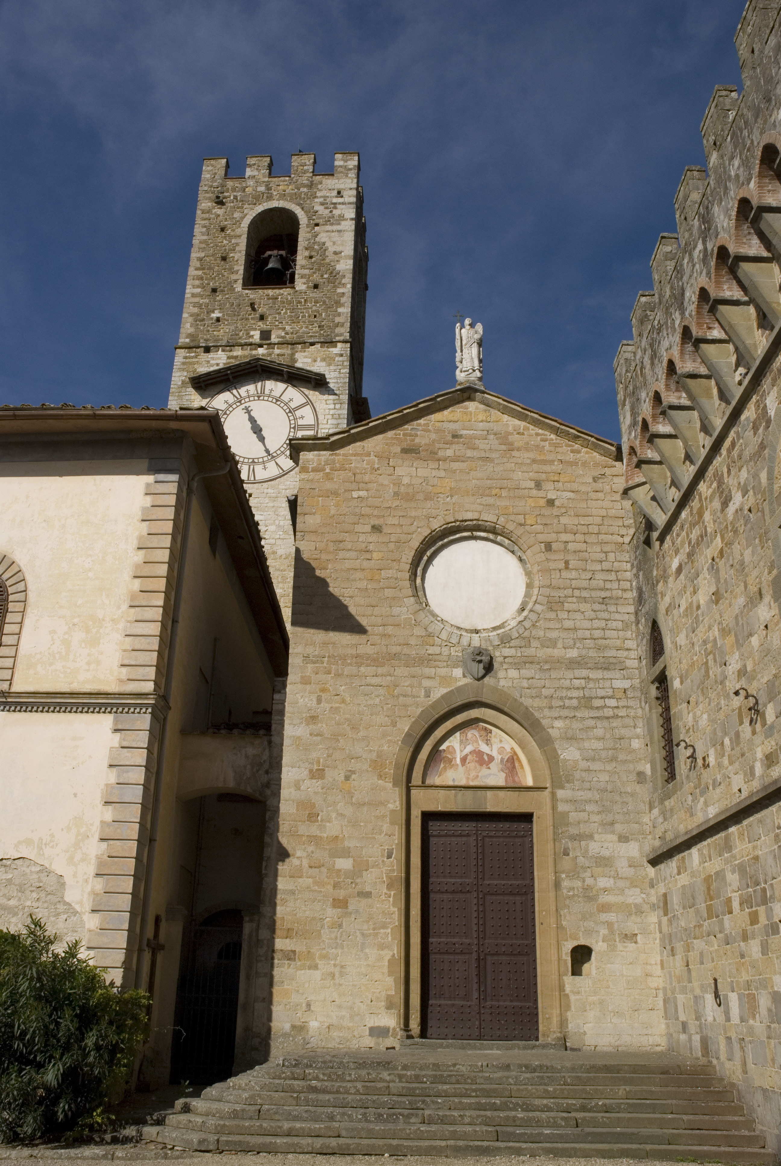 Chiesa di San Michele a Badia a Passignano,Firenze